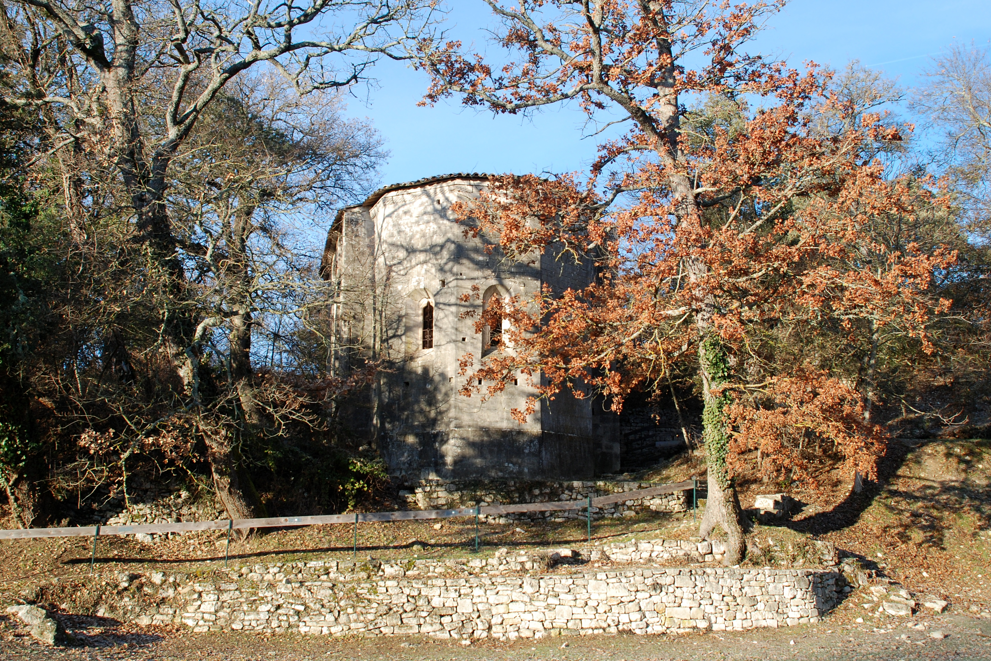 France - Provence - Prieuré de Carluc